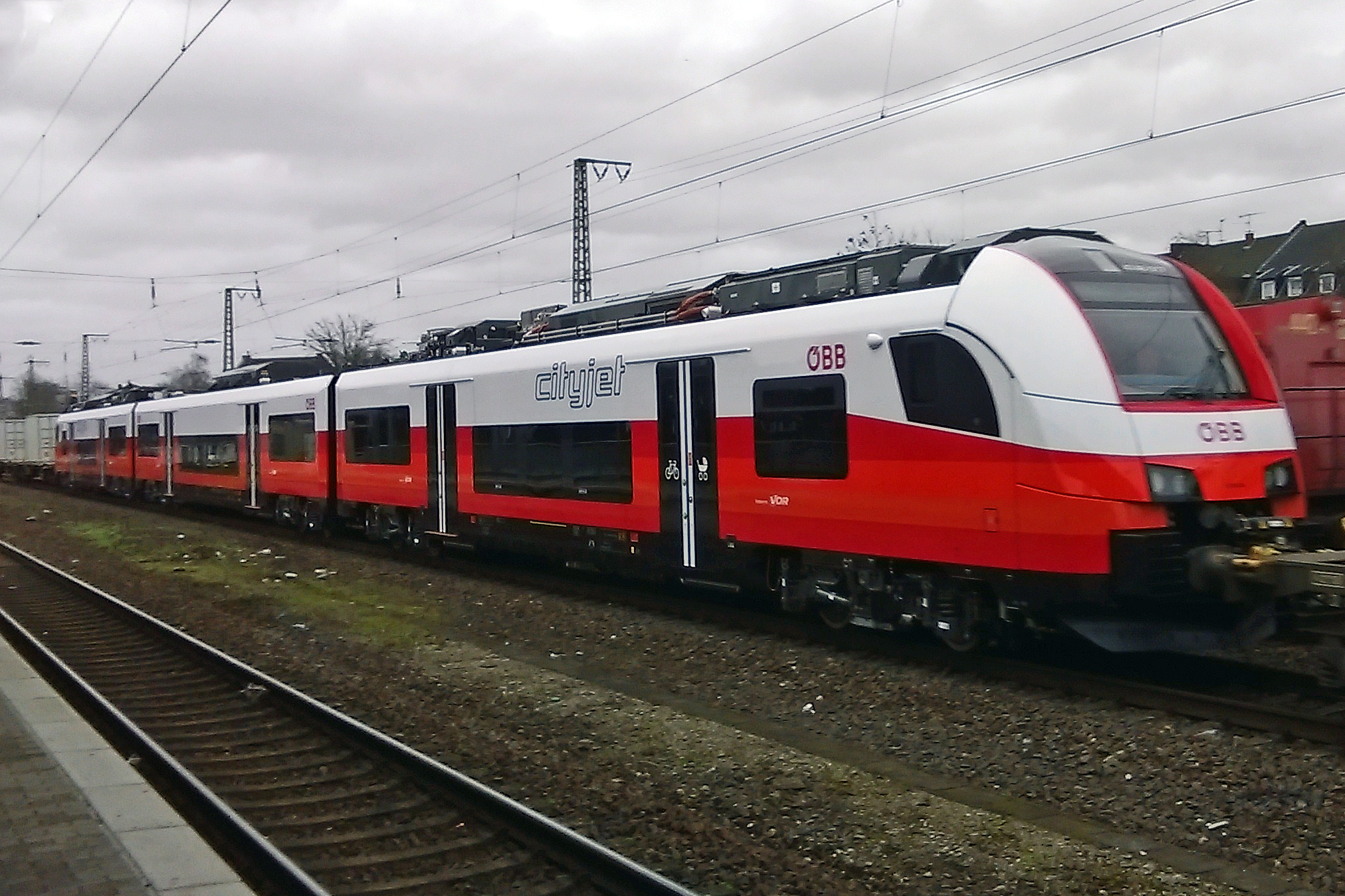 Cityjet der ÖBB (Desiro Mainline) als S-Bahnzug der Baureihe 4746 bei der Überführung von der Waggonfabrik Uerdingen zum Prüfcenter Wegberg-Wildenrath, hier am Bahnhof Krefeld-Uerdingen